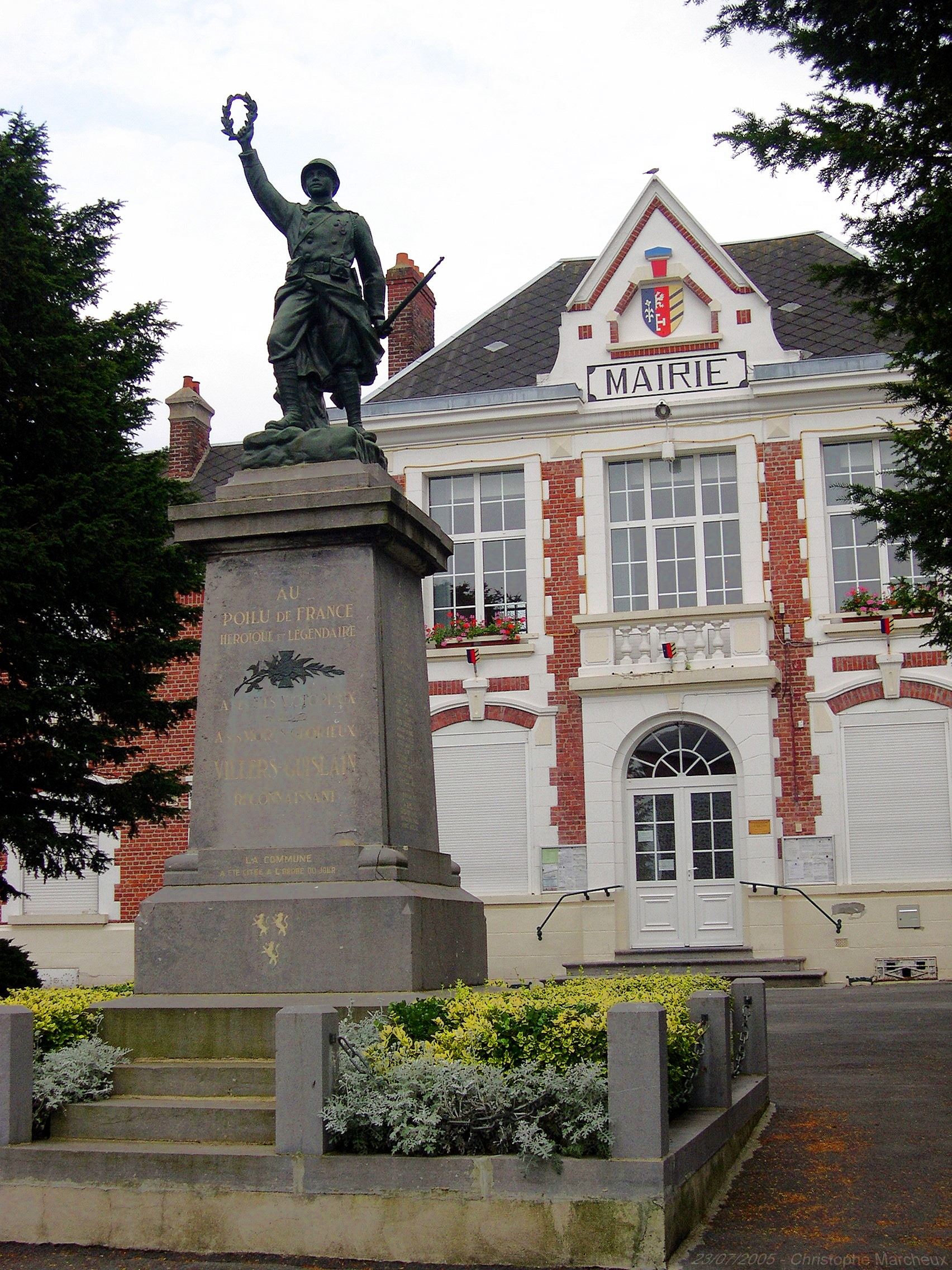 La mairie et l'Eglise de la commune de Villers-Guislain (59) Photo personnelle, libre de tous droits.